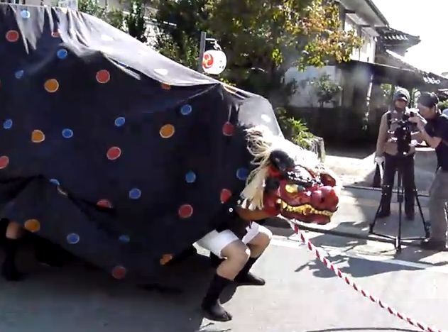 大御食神社の獅子練り